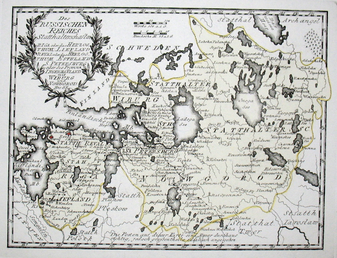 Des Russischen Reiches Statthalterschaften Riga oder das Herzogthum Liefland Reval oder das Herzogthum Esthland, S. Petersburg oder die Provinz Ingermannland mit Wiburg und Nowgorod. Nro. 65. Kolorierter Kupferstich